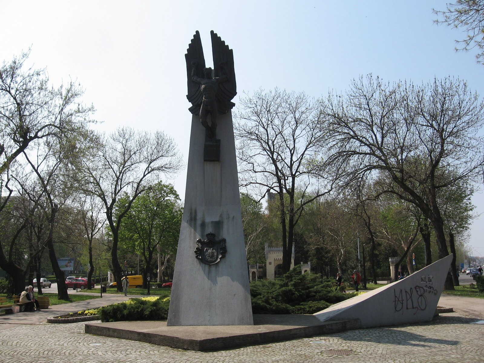 Споменик палим пилотима на Тргу Мије Станимировића. Снимљено у априлу 2010.